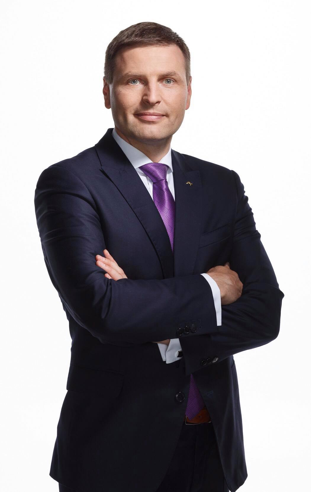 Hanno Pevkur